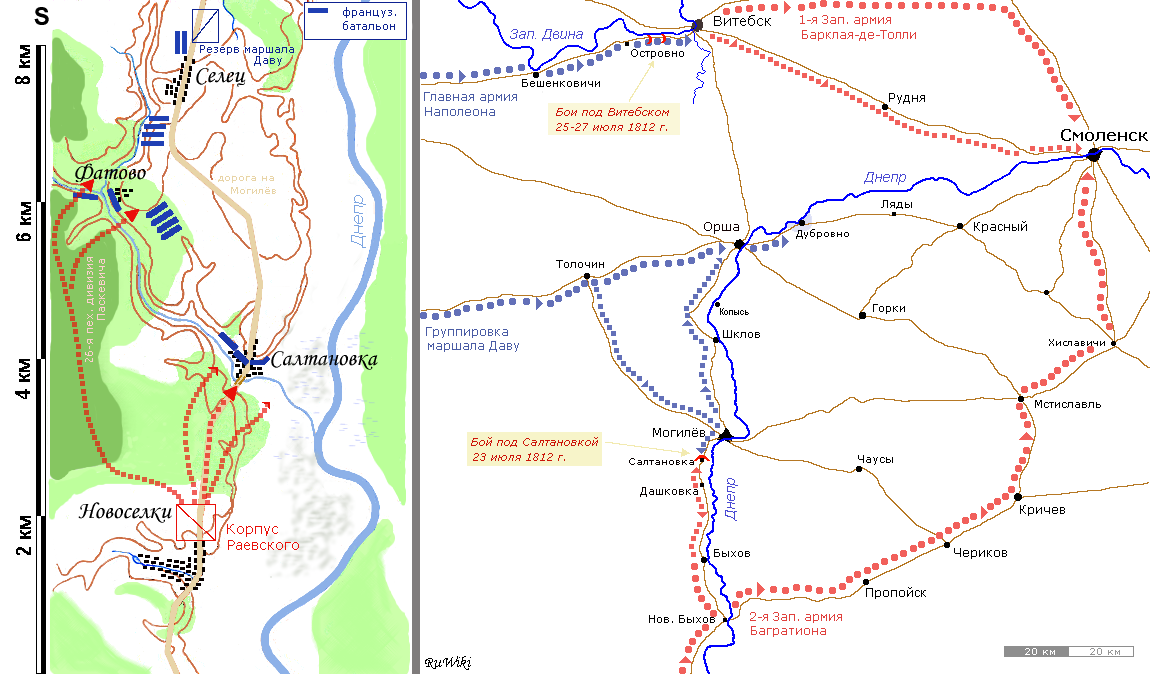 Бой корпуса Раевского из 2-й армии Багратиона с частями маршала Даву 23 июля 1812 года. Более общий план показывает схему соединения русских армий под Смоленском. Корпус Даву остановился в Дубровно, основная армия Наполеона встала вокруг Витебска.